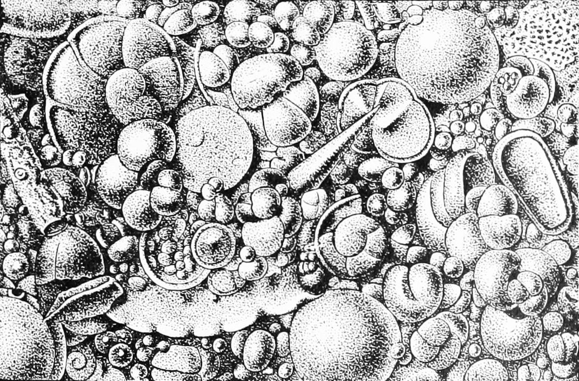 Globigerina ooze